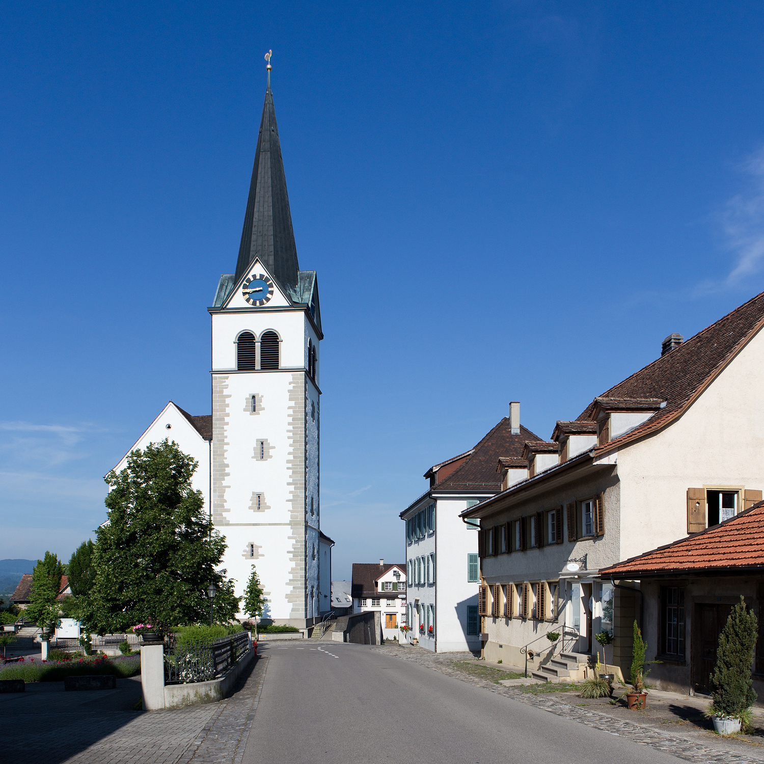 Reformierte Kirche von Sulgen